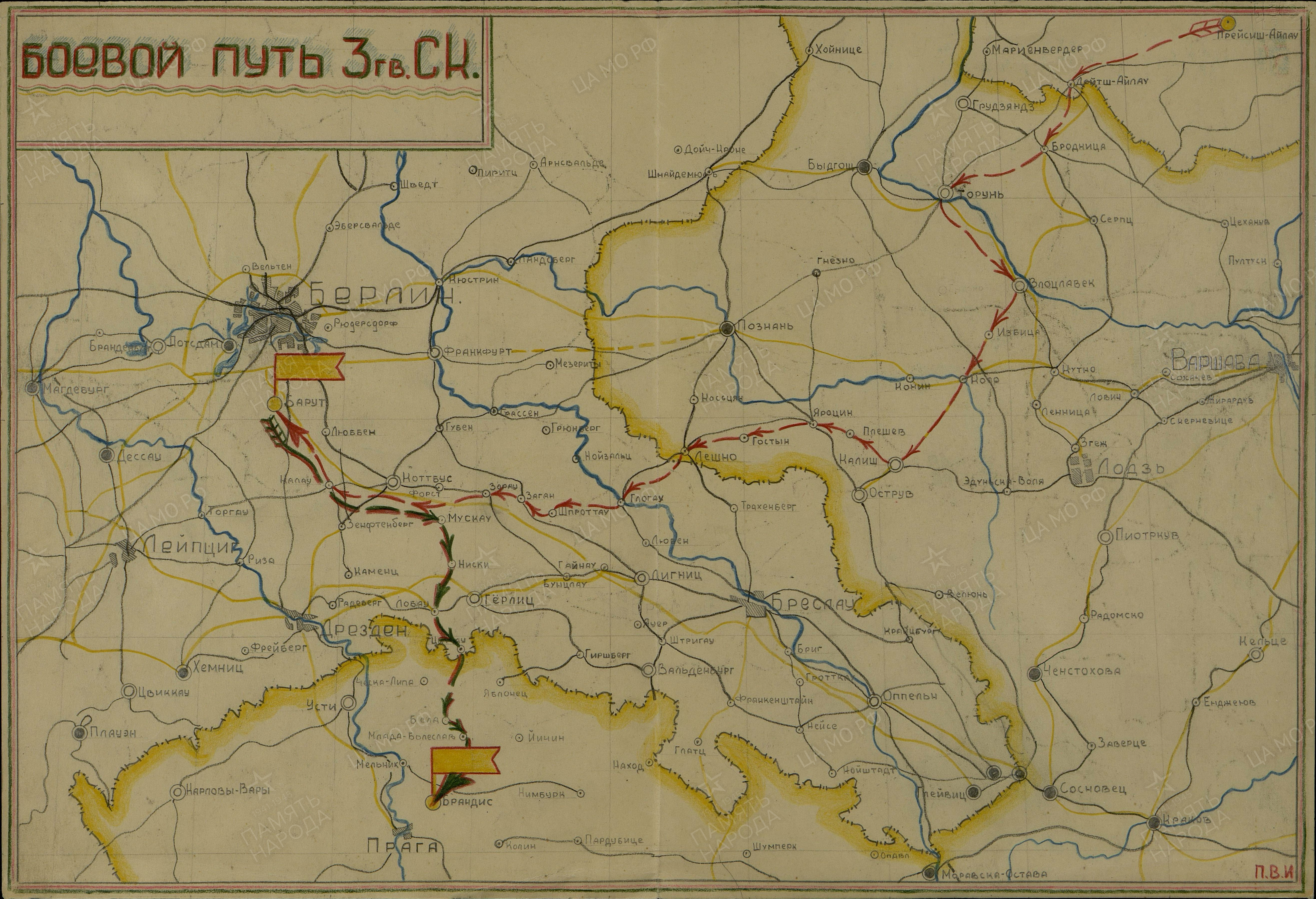 Боевой путь 3-го гвардейского стрелкового корпуса 1943—1945 гг.